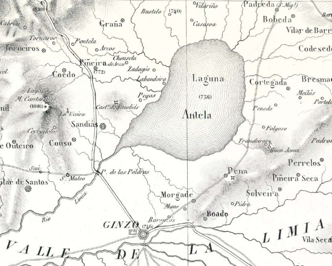 Detalle da lagoa de Antela da Carta Xeométrica de Galicia de Domingo Fontán.